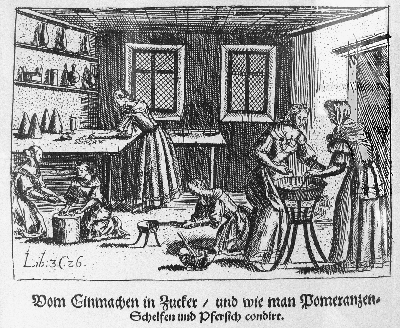 „Vom Einmachen in Zucker / und wie man Pomeranzen, Schelfen und Pfersich condirt“; Stich im Zucker-Museum Berlin